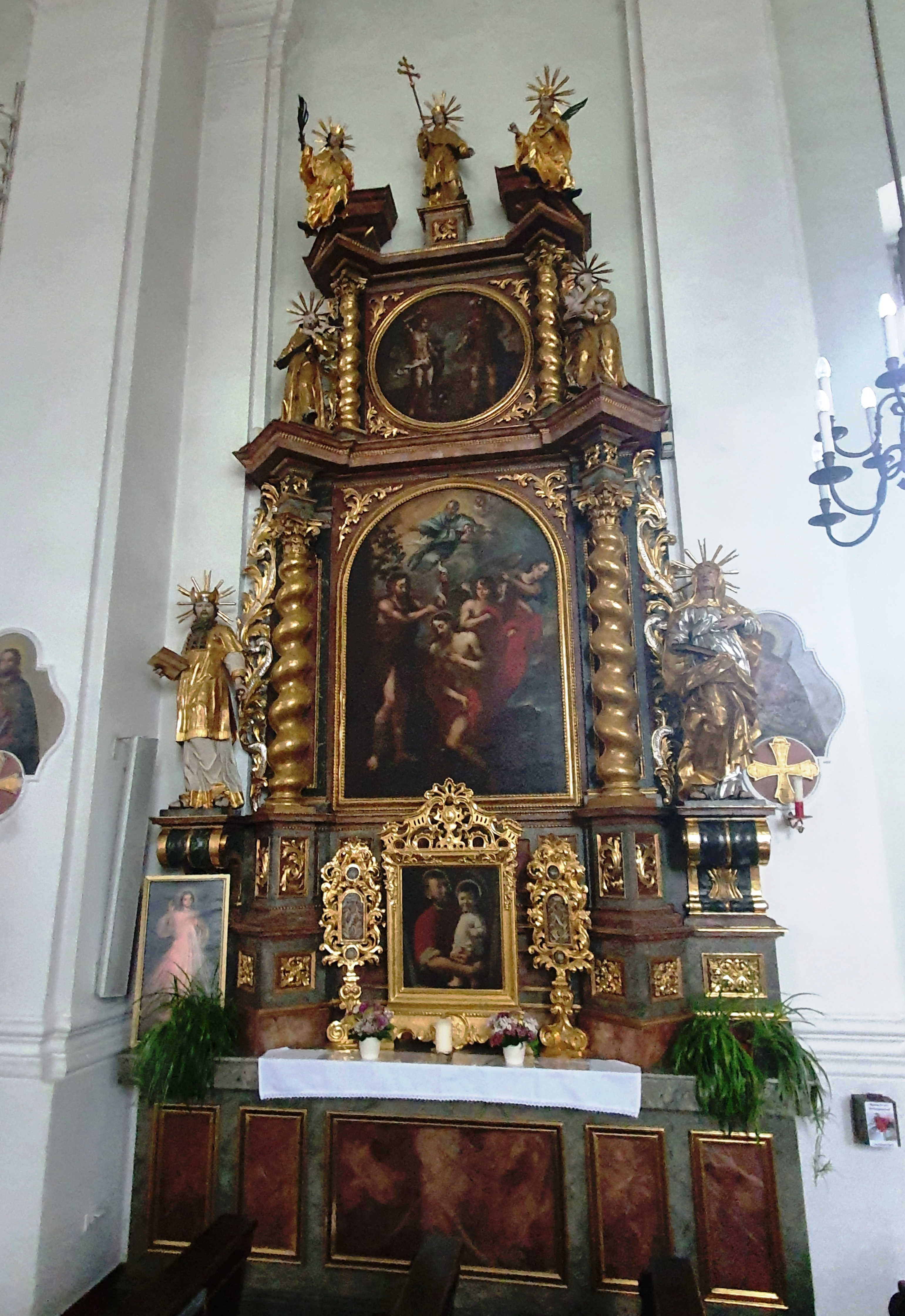 Taufe-Christi-Altar Bergheim, rechter Seitenaltar